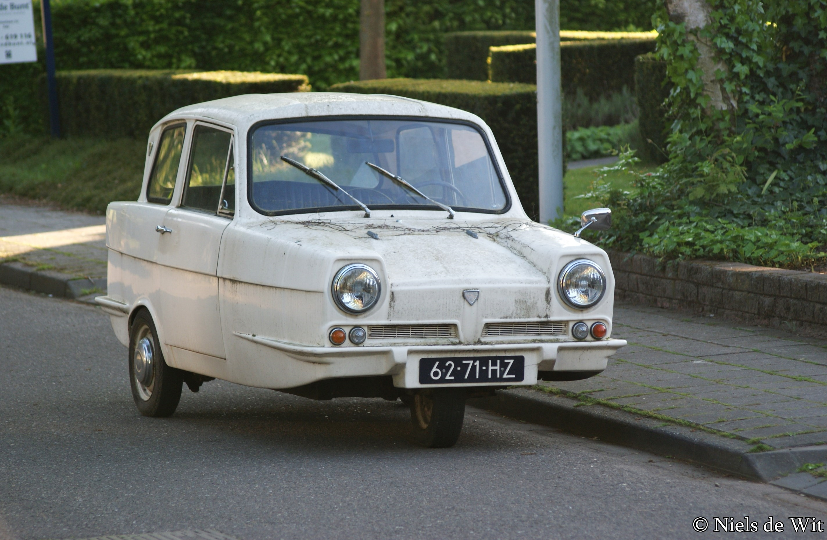 62-71-HZ